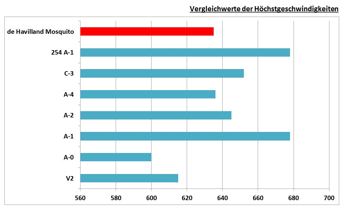 Höchstgeschwindigkeiten verschiedener Ta-154 Versionen im Vergleich zur de Haviland Mosquito